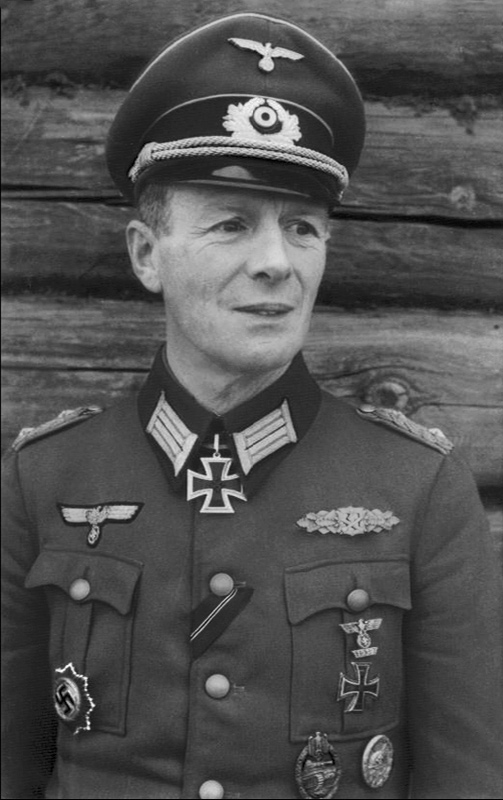 Oberst Gerhard Schmidhuber, Kommandeur eines Panzerregiments